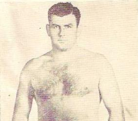 "Toar" Morgan en une du magazine de catch Toar Morgan Fan Club de 1950.